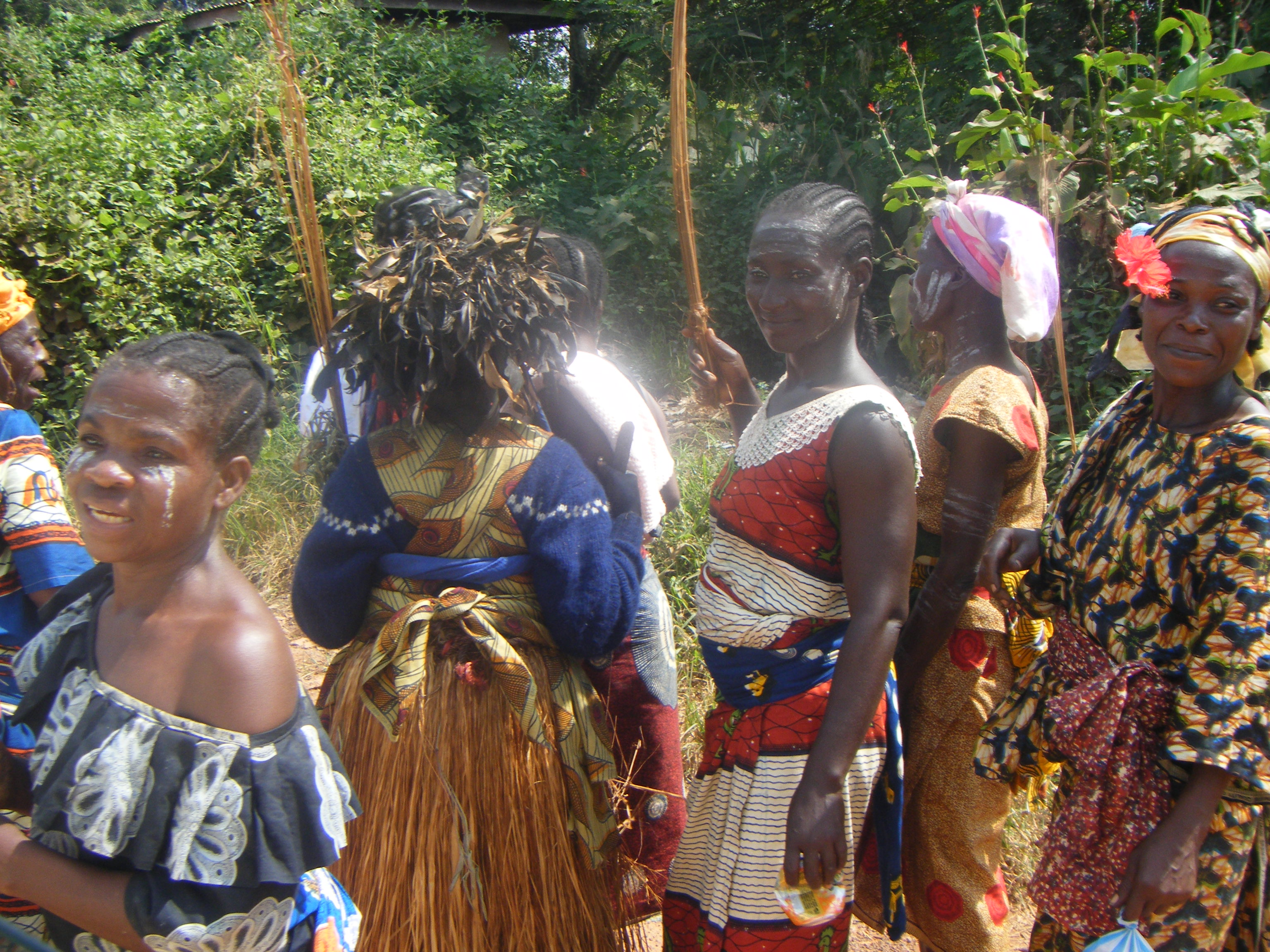 FEMALE KRAHN DEVIL